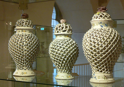 Netzvasen aus der Zeit um 1750 bis 1790 der Fayence-Manufaktur Münden im Museum Münden